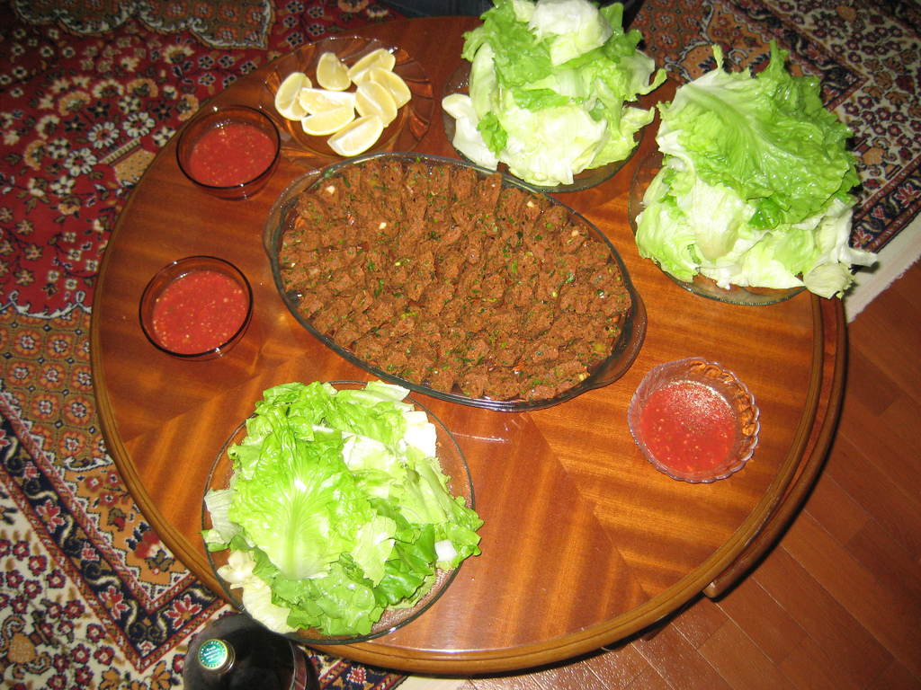 I kofte ile sahur